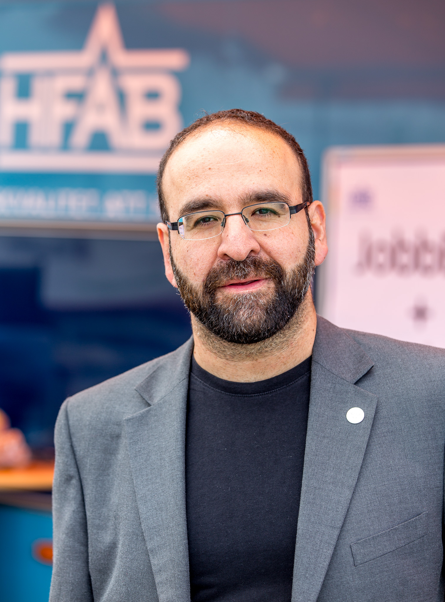 Mehmet Kaplan, Sveriges bostads- och stadsutvecklingsminister